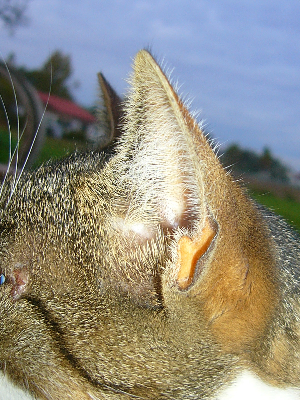 Katzenohr seitlich